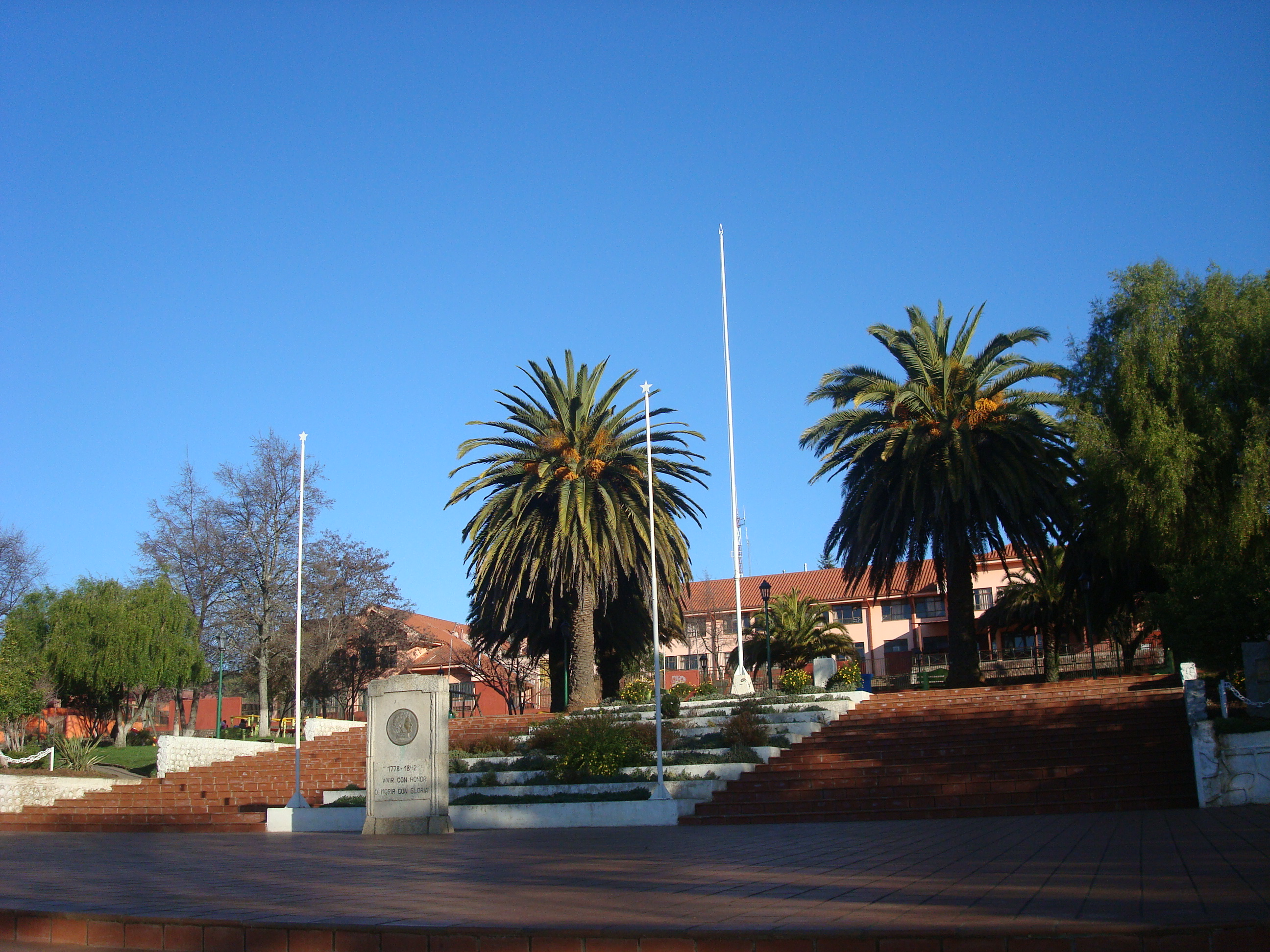 Plaza de Florida Provincia de Concepción, Chile Agosto de 2012